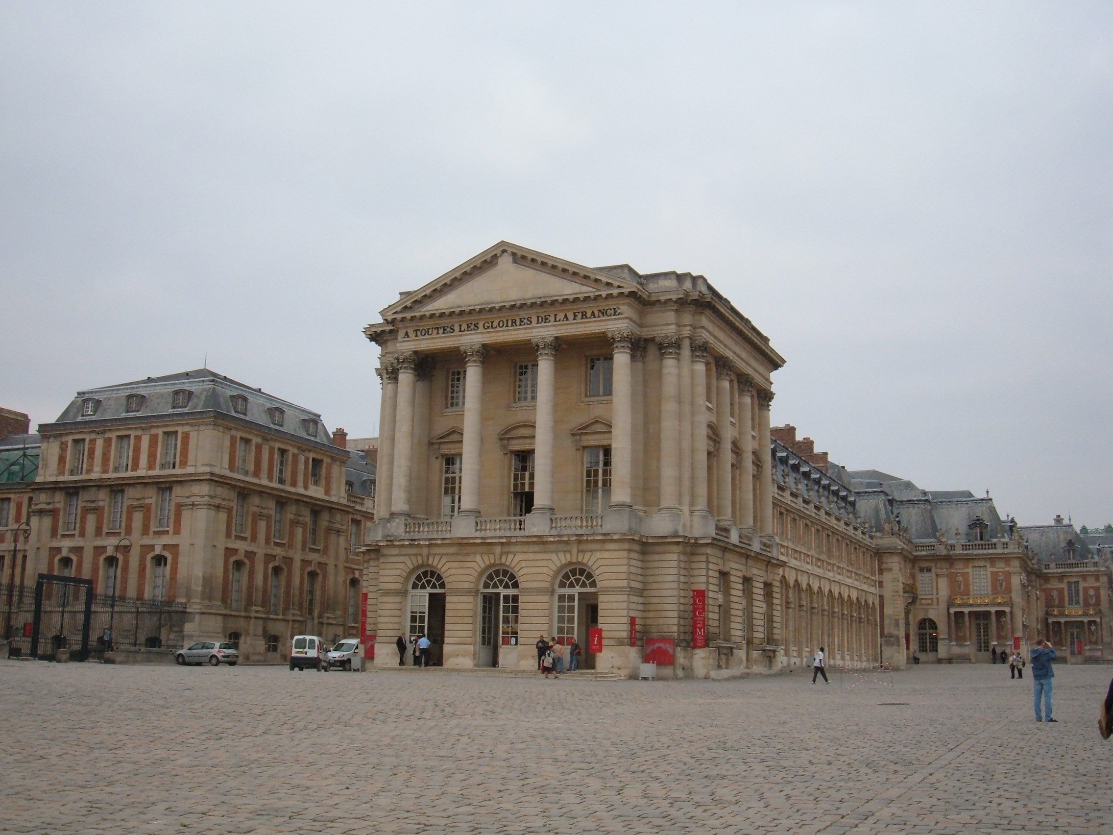 The cour d'honneur of the Château de Versailles.